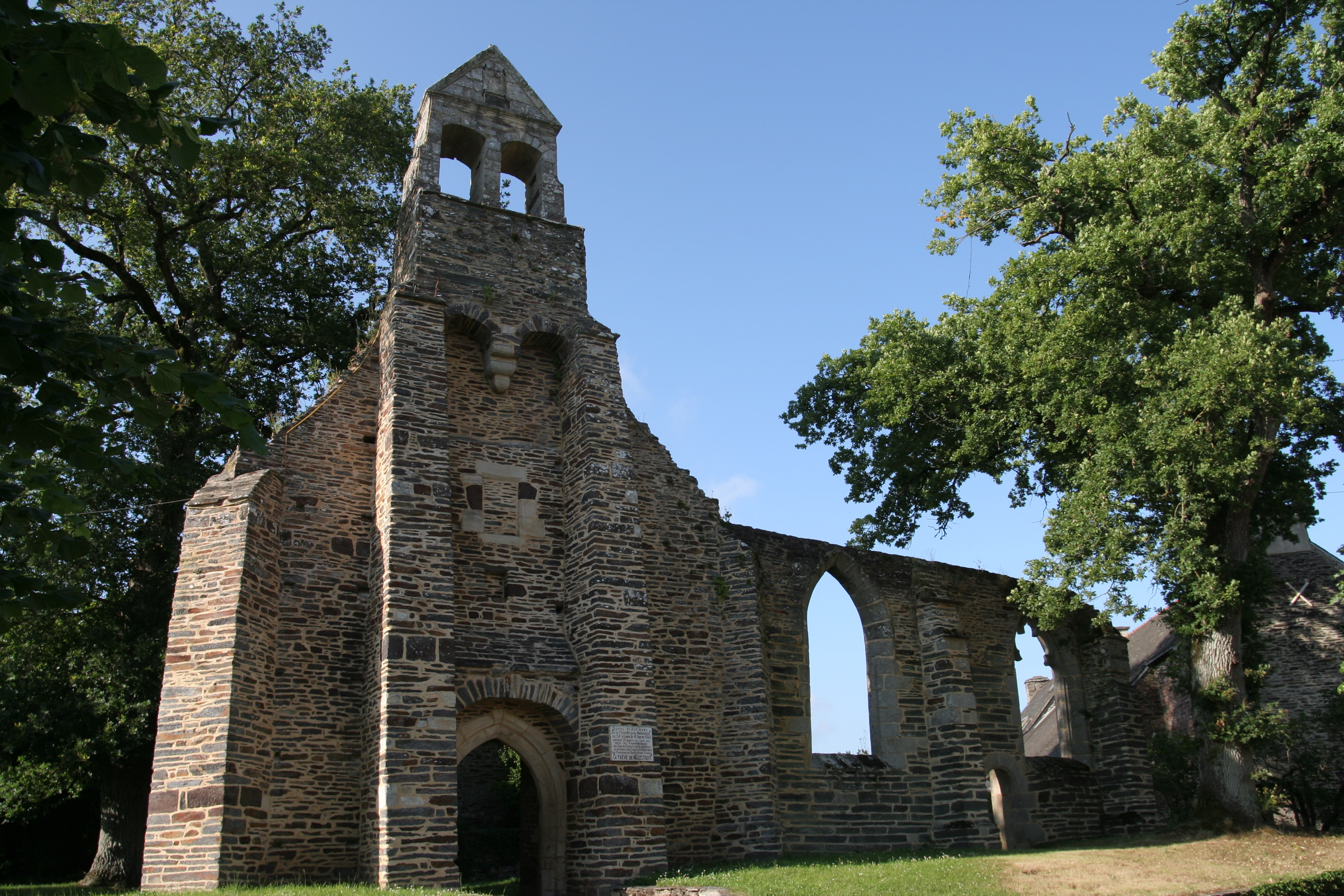 La Chapelle de la Madeleine de Malestroit : façade sud.